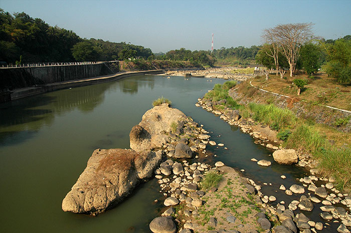 Kali Progo, di Jogjakarta